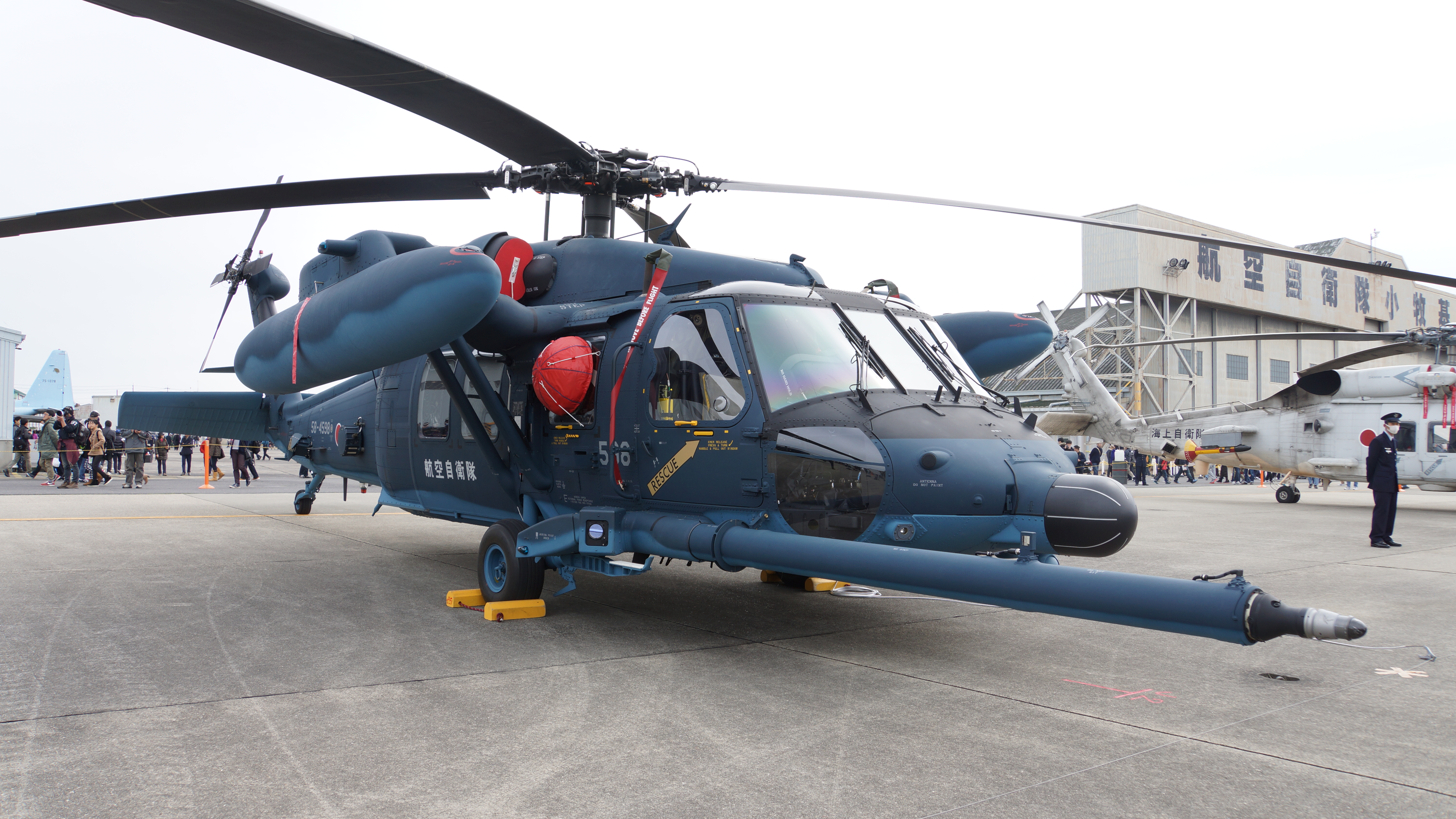 航空自衛隊 UH-60J救難ヘリコプター（58-4598号機）。 2016年3月13日 小牧基地にて。